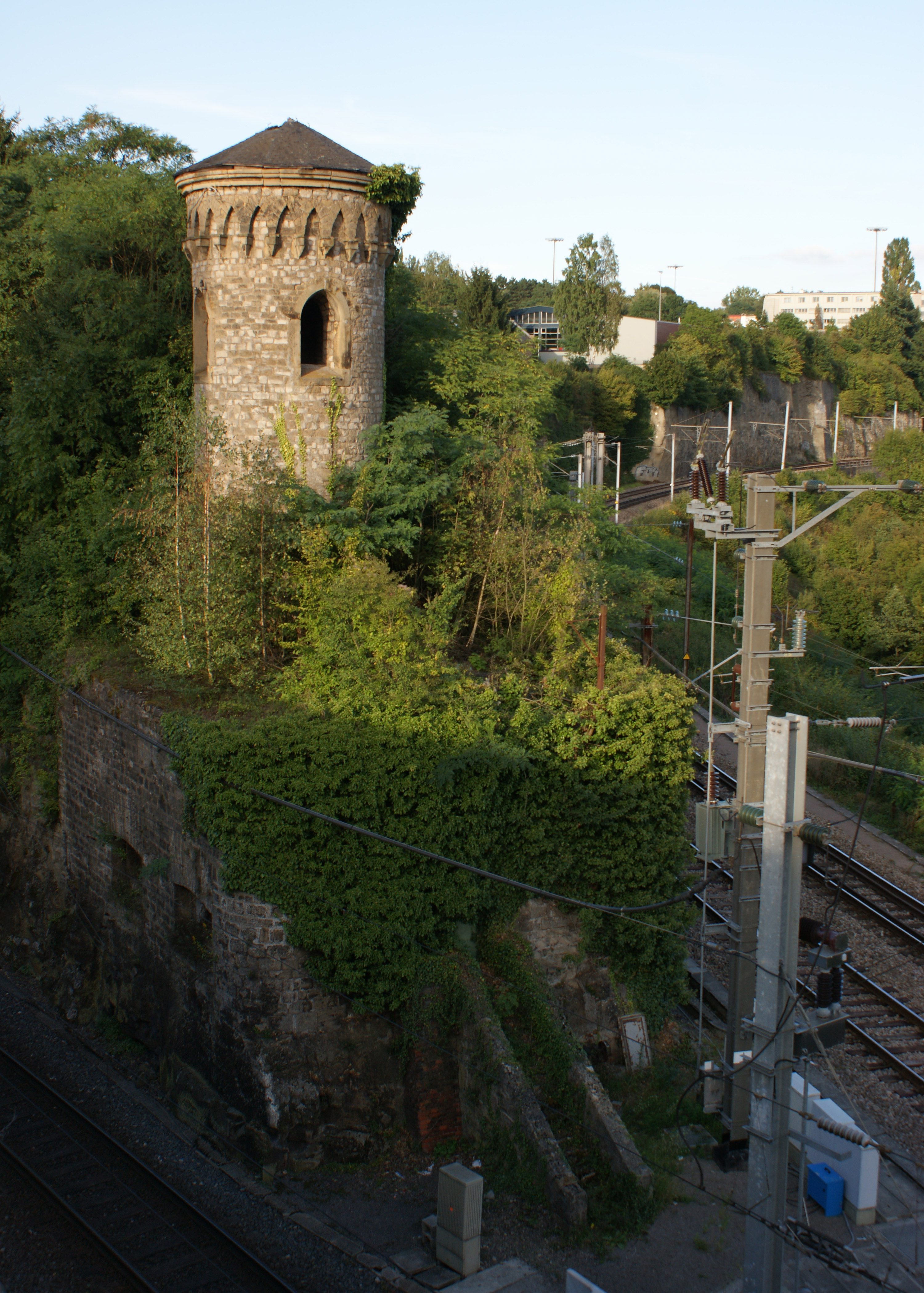 Rummbatterie. September 2010